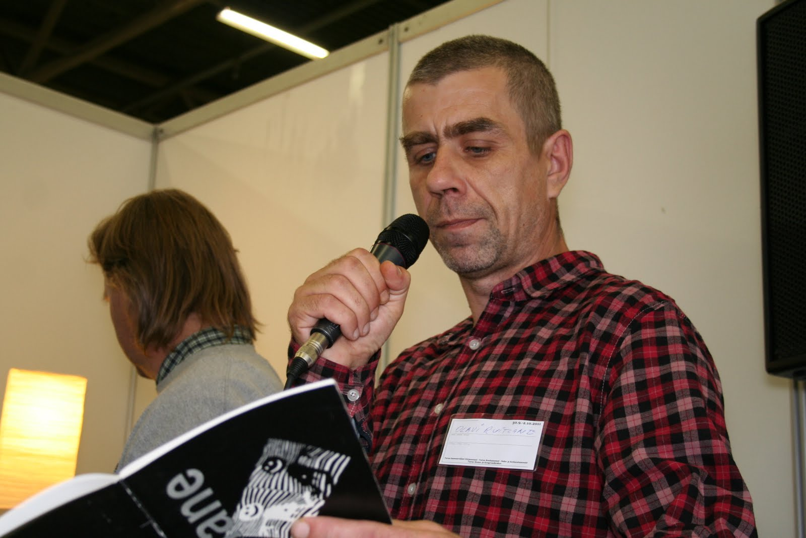 Olavi Ruitlane Turu raamatumessil.